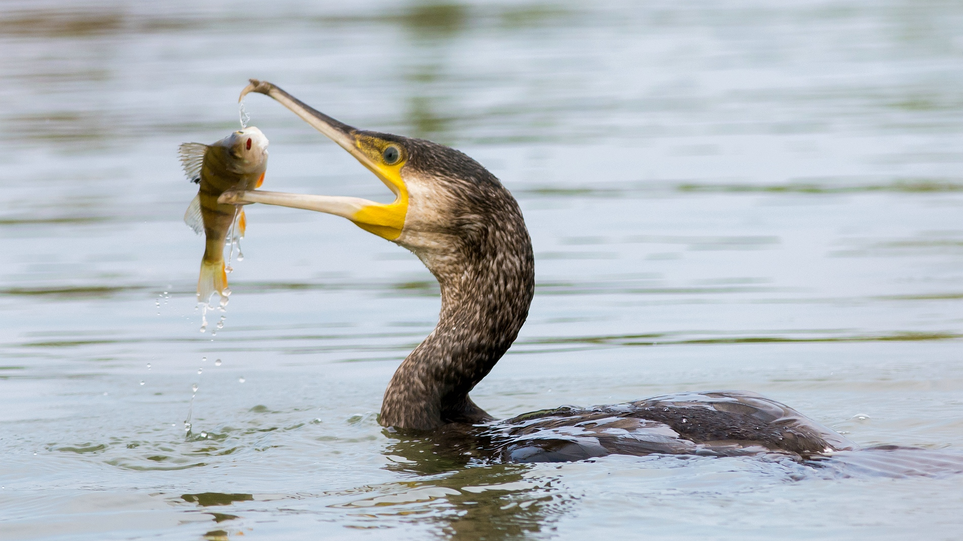 Phalacrocorax carbo